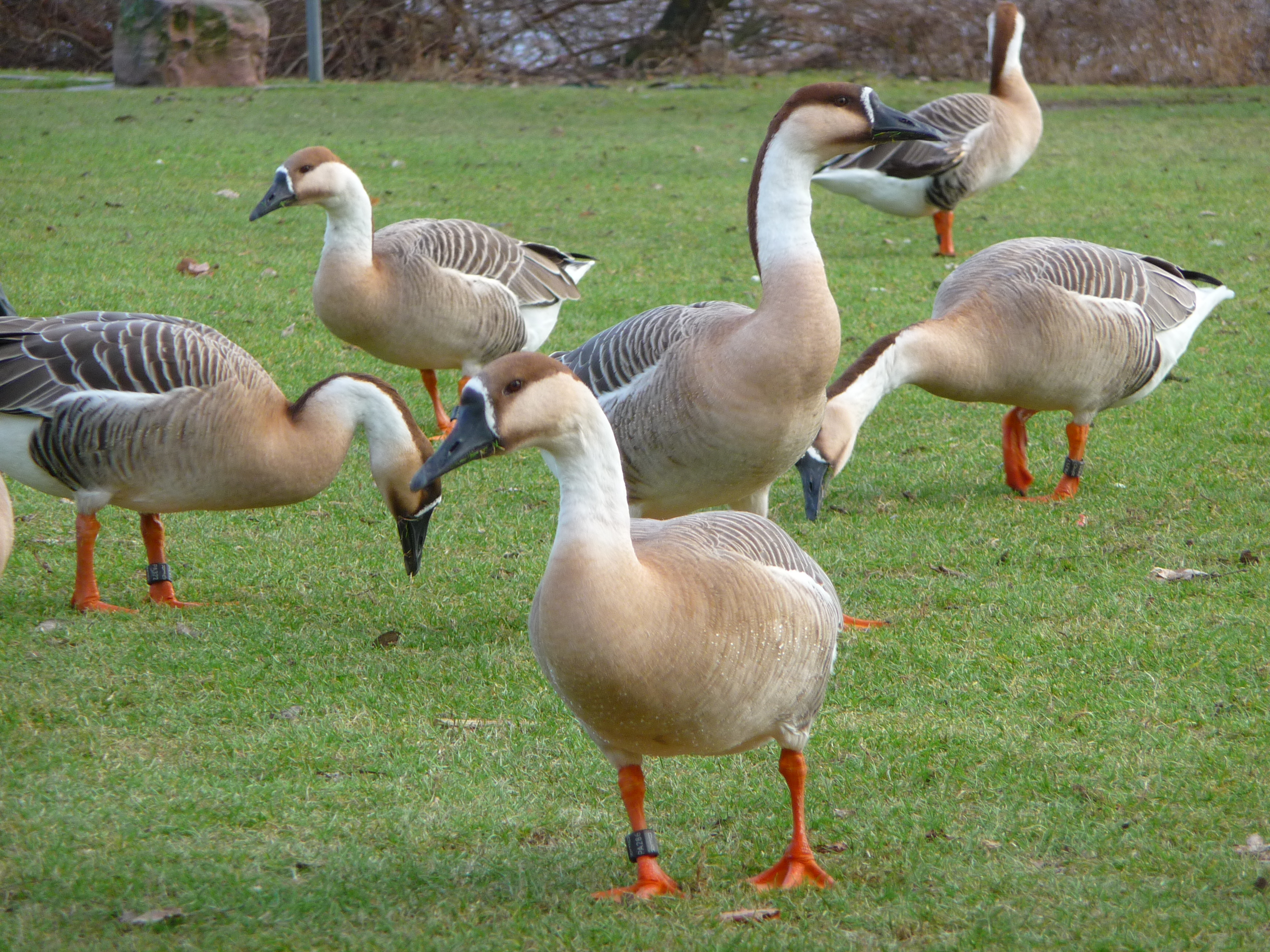 Schwanengänse (Anser cygnoides) am nördlichen Ufer des Neckars in Heidelberg (Baden-Württemberg, Deutschland)